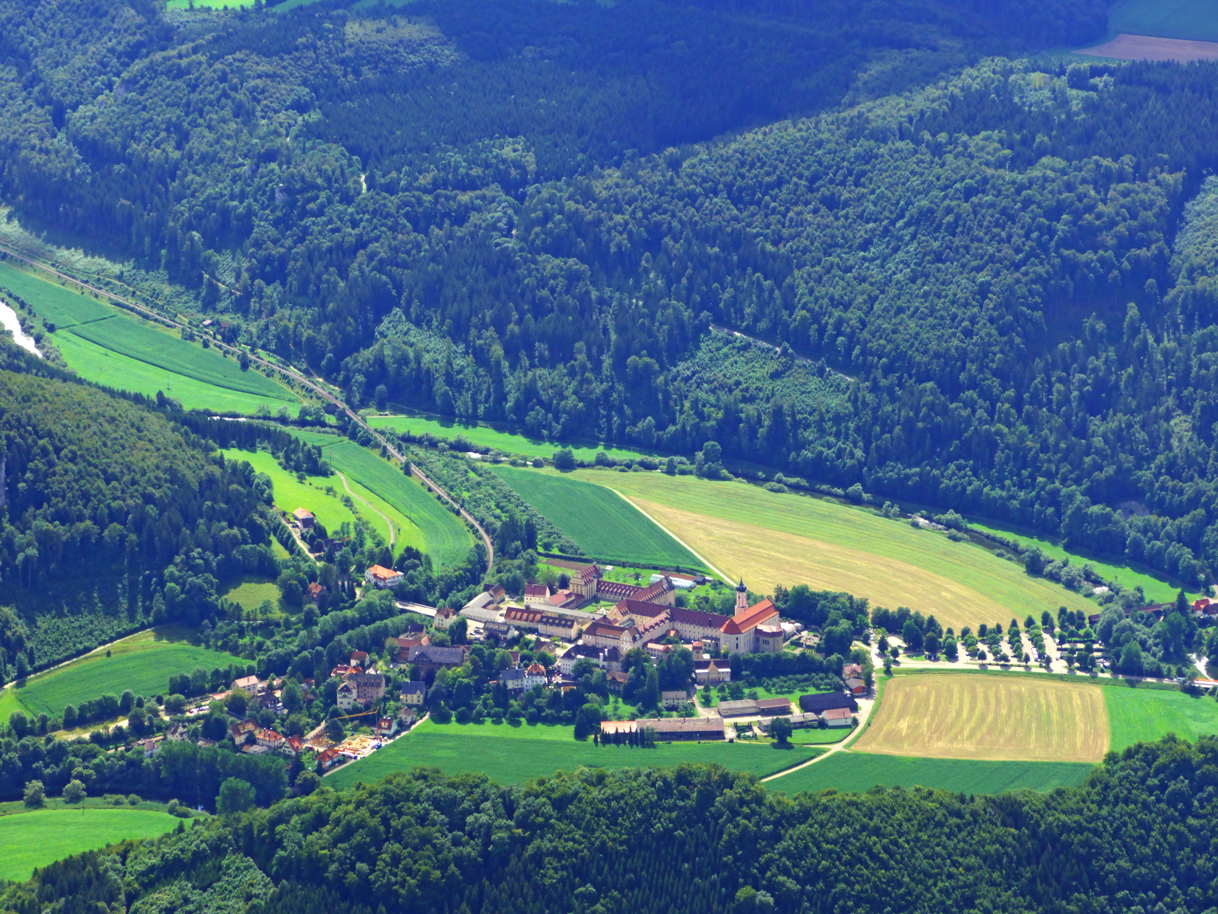 Beuron From Above